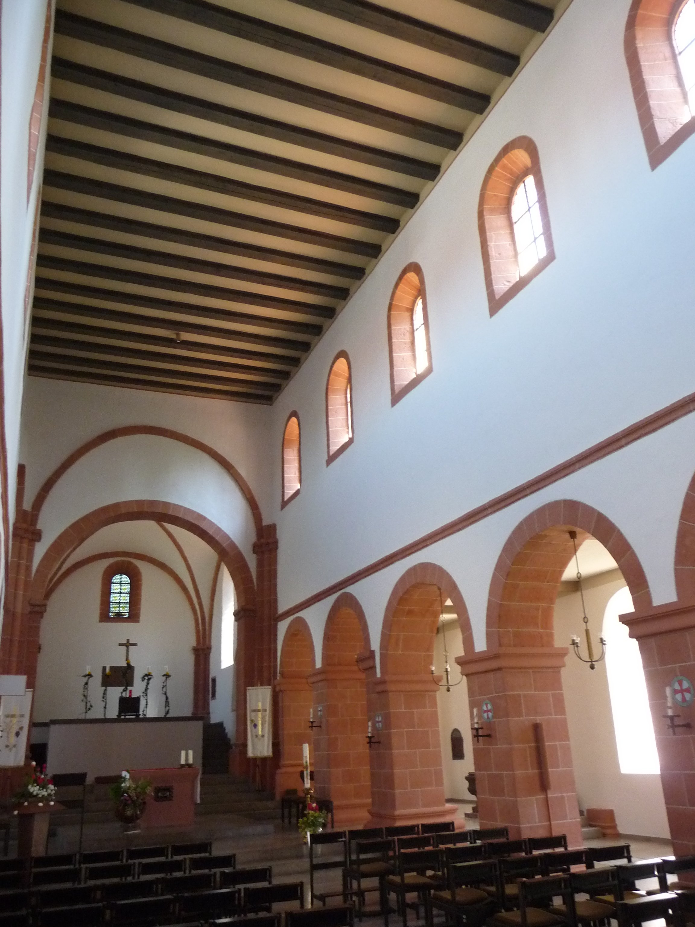 Die katholische Pfarrkirche St. Lambert ist ein denkmalgeschütztes Kirchengebäude in Bechtheim, Rheinland-Pfalz.